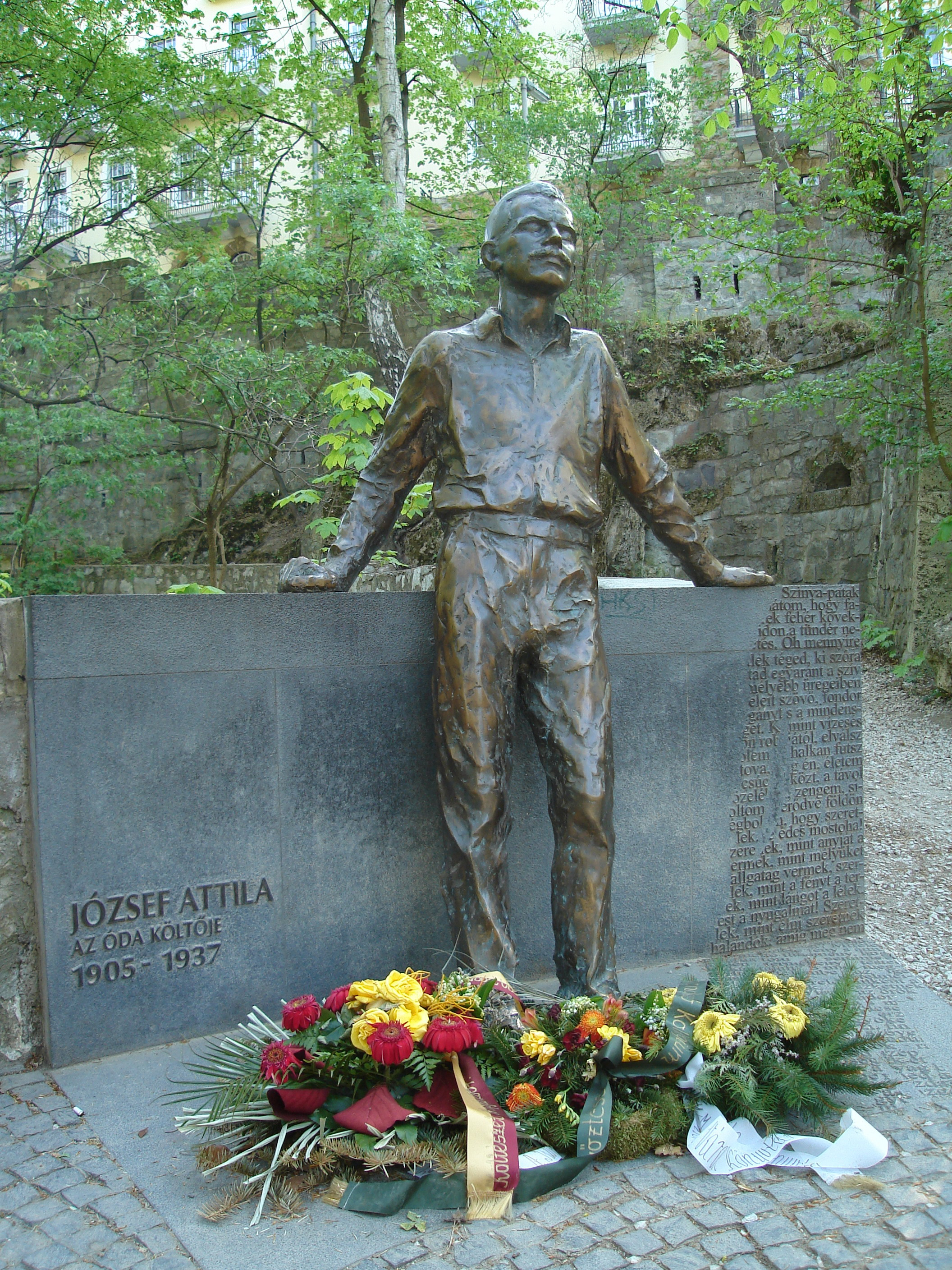 József Attila szobra Lillafüreden, a Palotaszálló függőkertjében, melyet a költő születésének 100. évfordulójára állítottak fel. Alkotója: Varga Éva, Munkácsy-díjas szobrászművész. Fekist saját felvétele.